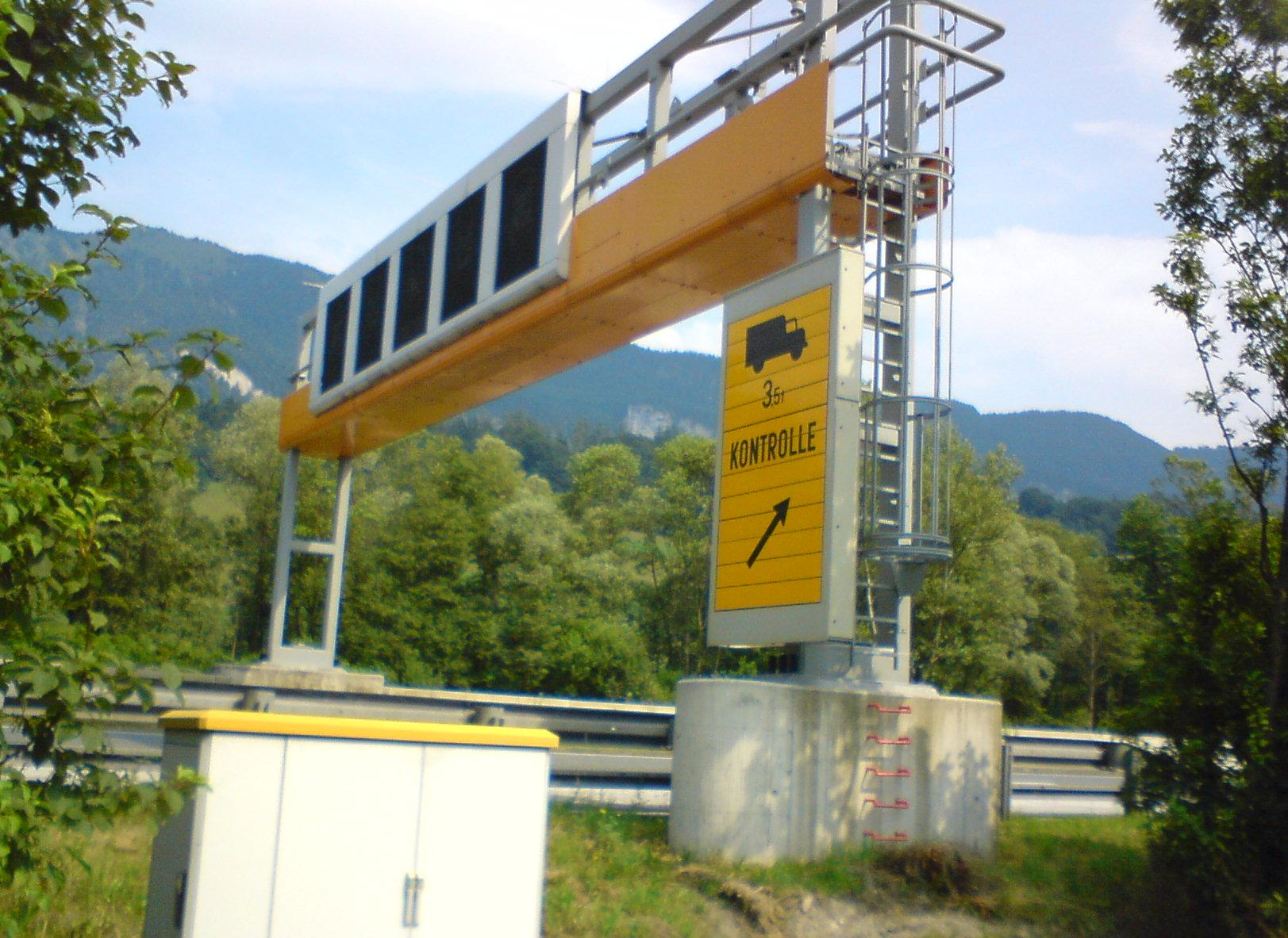 Verkehrsbeeinflussungsanlage auf A12 bei Radfeld